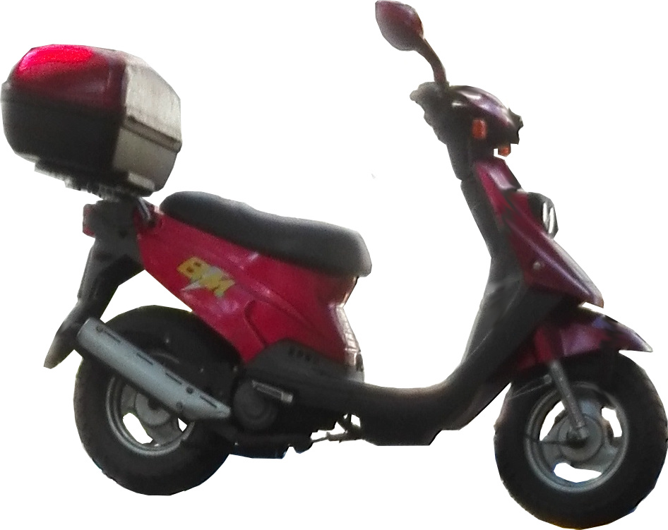 PGO Big Max 50